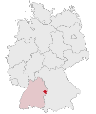 Landkreis Heidenheim, Baden-Württemberg, Germany